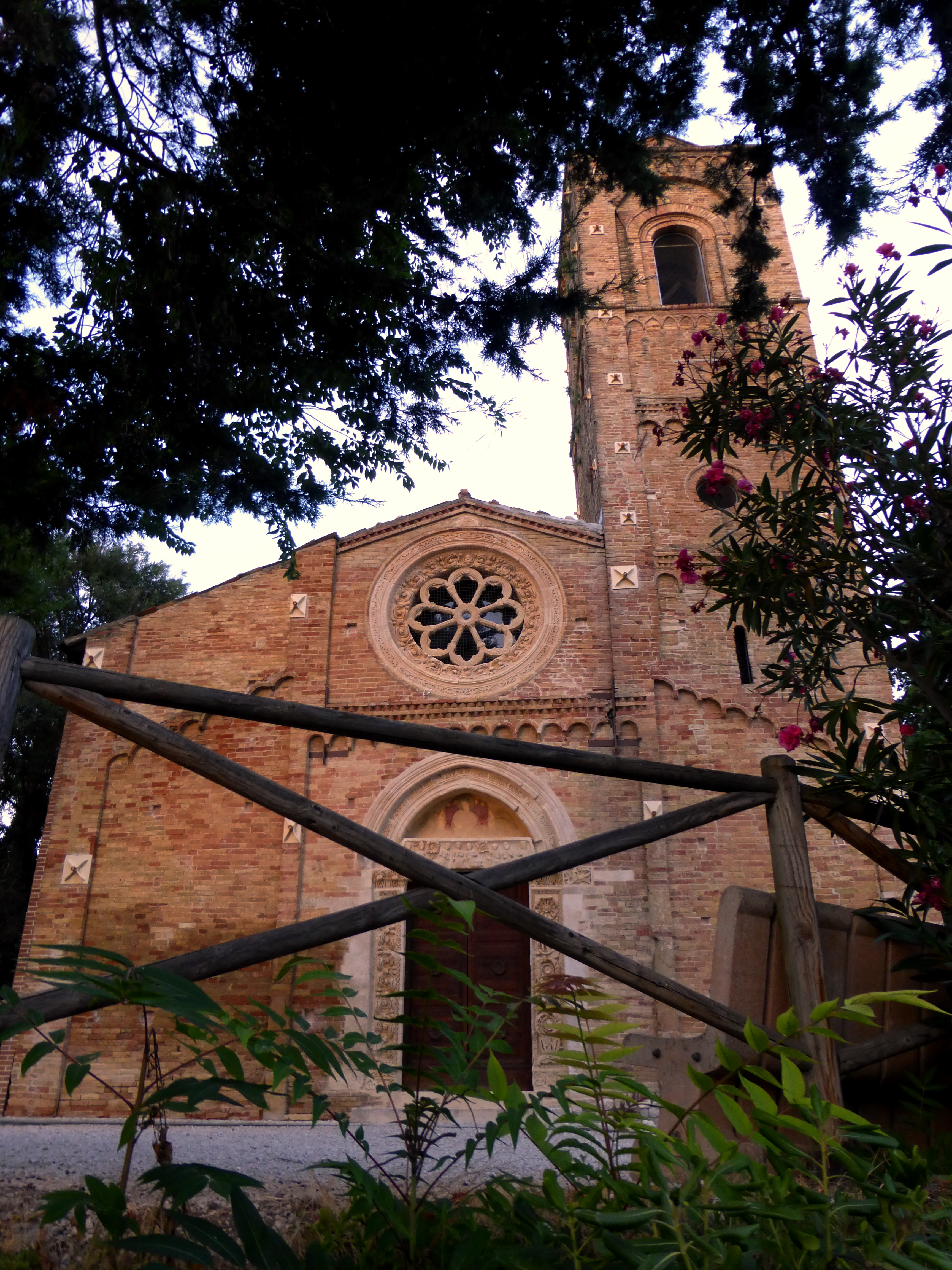 Facciata della chiesa di Santa Maria Maggiore a Pianella, Pescara.